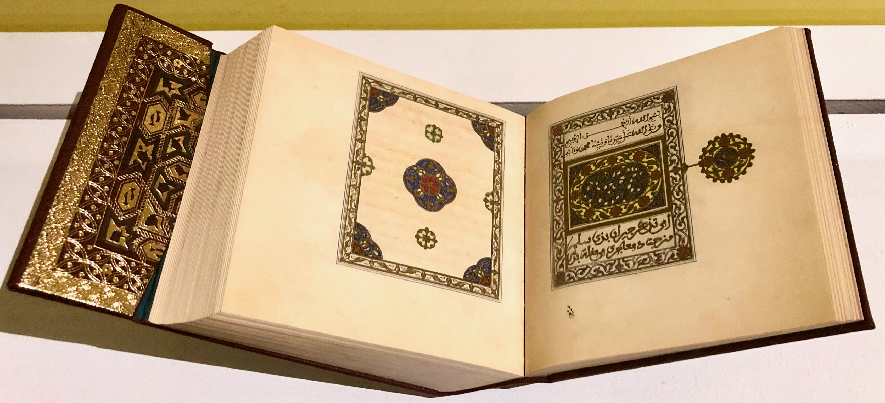 دلائل الخيرات. الجزولي. القرن التاسع عشر. المغرب. مخطوطة على ورق. Collection C. Hamès Vincennes. المكتبة الوطنية للمملكة المغربية، الرباط. 356 G. من معرض كنوز الإسلام في إفريقيا بمتحف محمد السادس للفن الحديث والمعاصر بالرباط، عام 2019